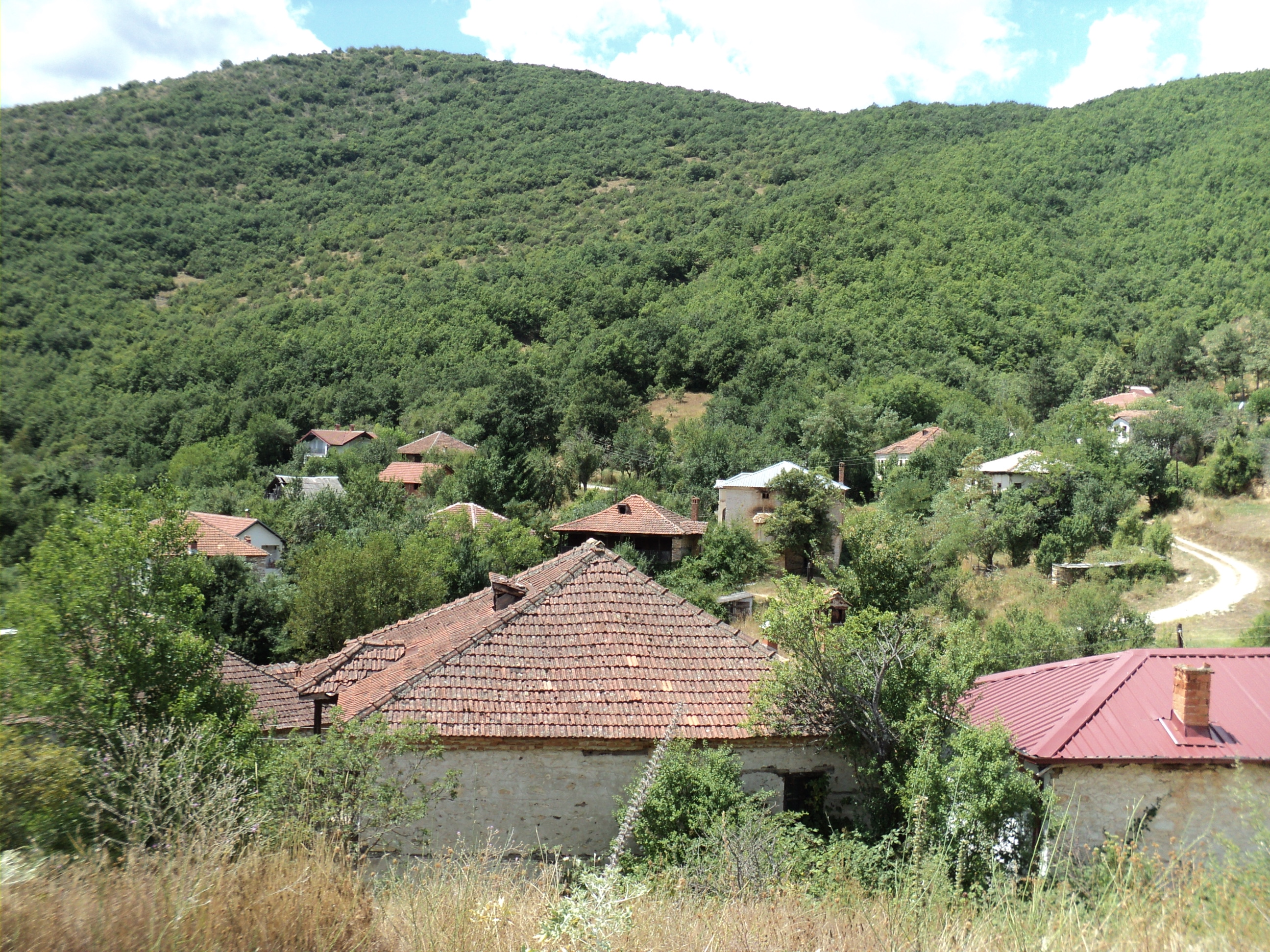 Pogled na selo Ižišta, opština Makedonski Brod, Republika Makedonija